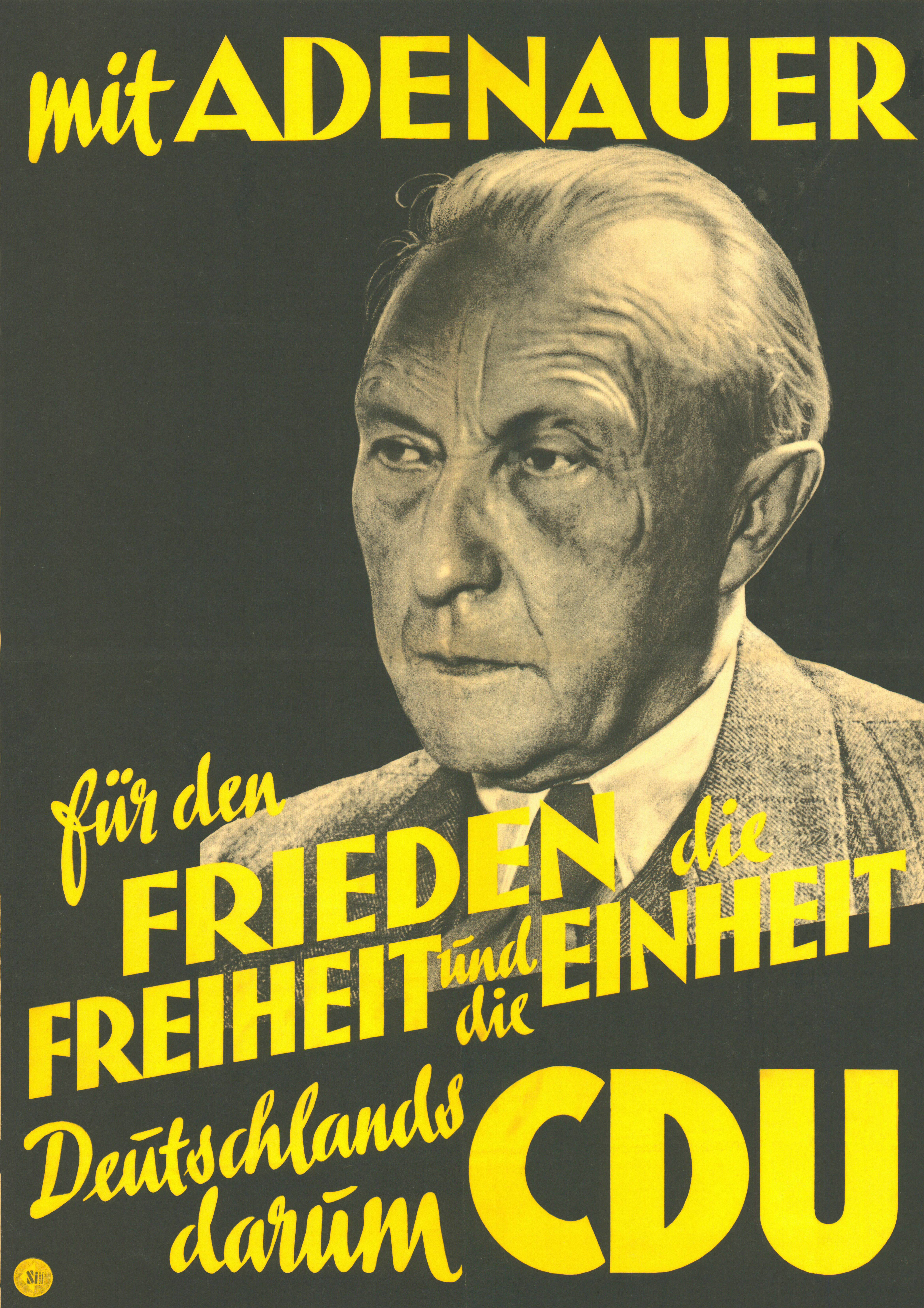 mit Adenauer für den Frieden, die Freiheit und die Einheit Deutschlands darum CDUAbbildung:PorträtfotoPlakatart:Kandidaten-/Personenplakat ohne PorträtKünstler_Grafiker:SI Klischees EntwürfeObjekt-Signatur:10-001: 104Bestand:Plakate zu Bundestagswahlen (10-001)GliederungBestand10-18:Plakate zu Bundestagswahlen (10-001) » Die 1. Bundestagswahl am 14. August 1949 » CDU » Mit PorträtfotoLizenz:KAS/ACDP 10-001: 104 CC-BY-SA 3.0 DE